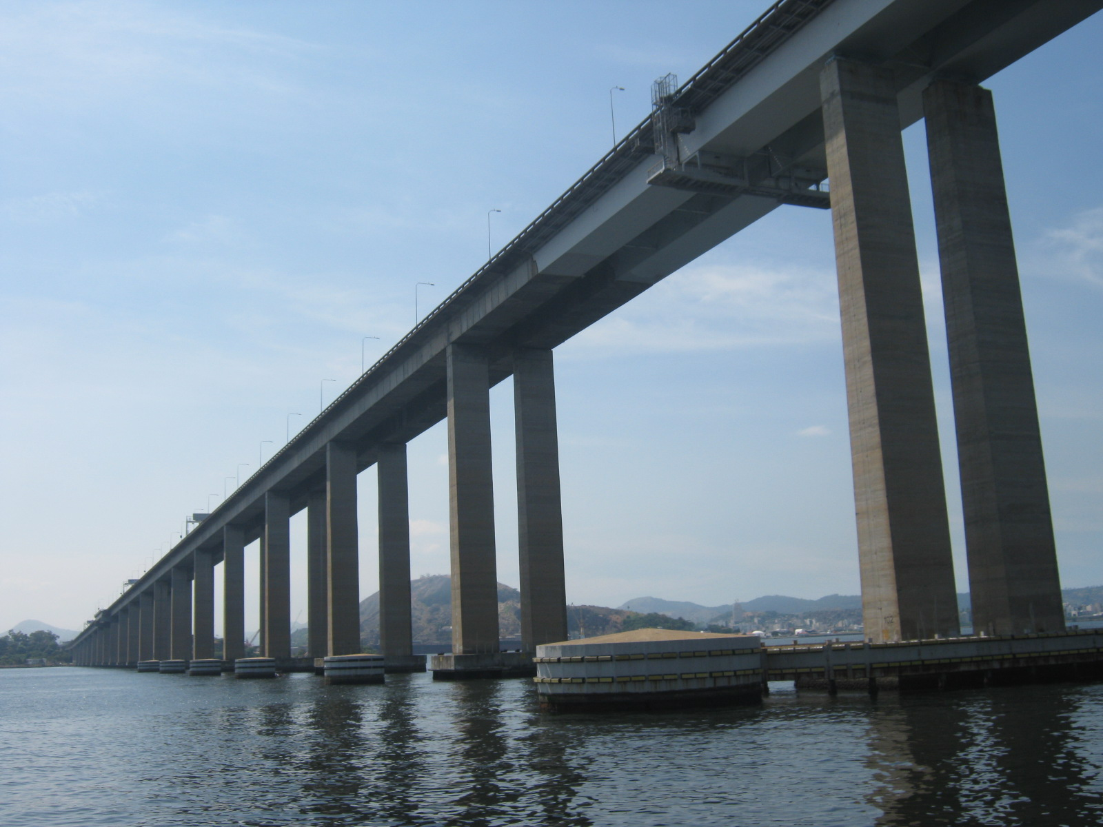 Rio-Niterói Bridge, Brazil (8)